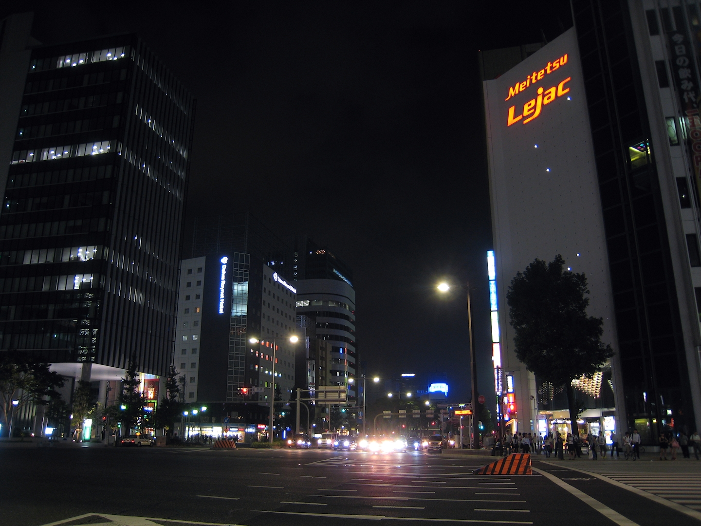 笹島交差点の夜景